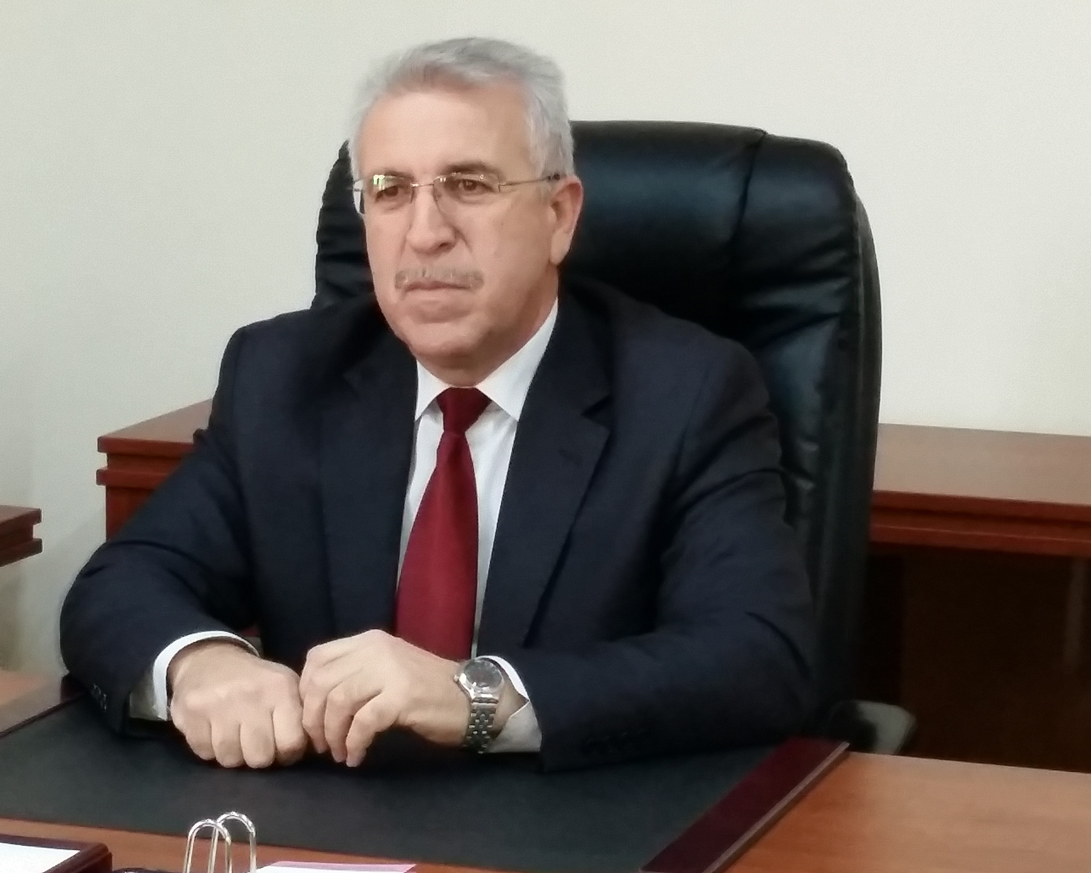 Vaqif Qasımov